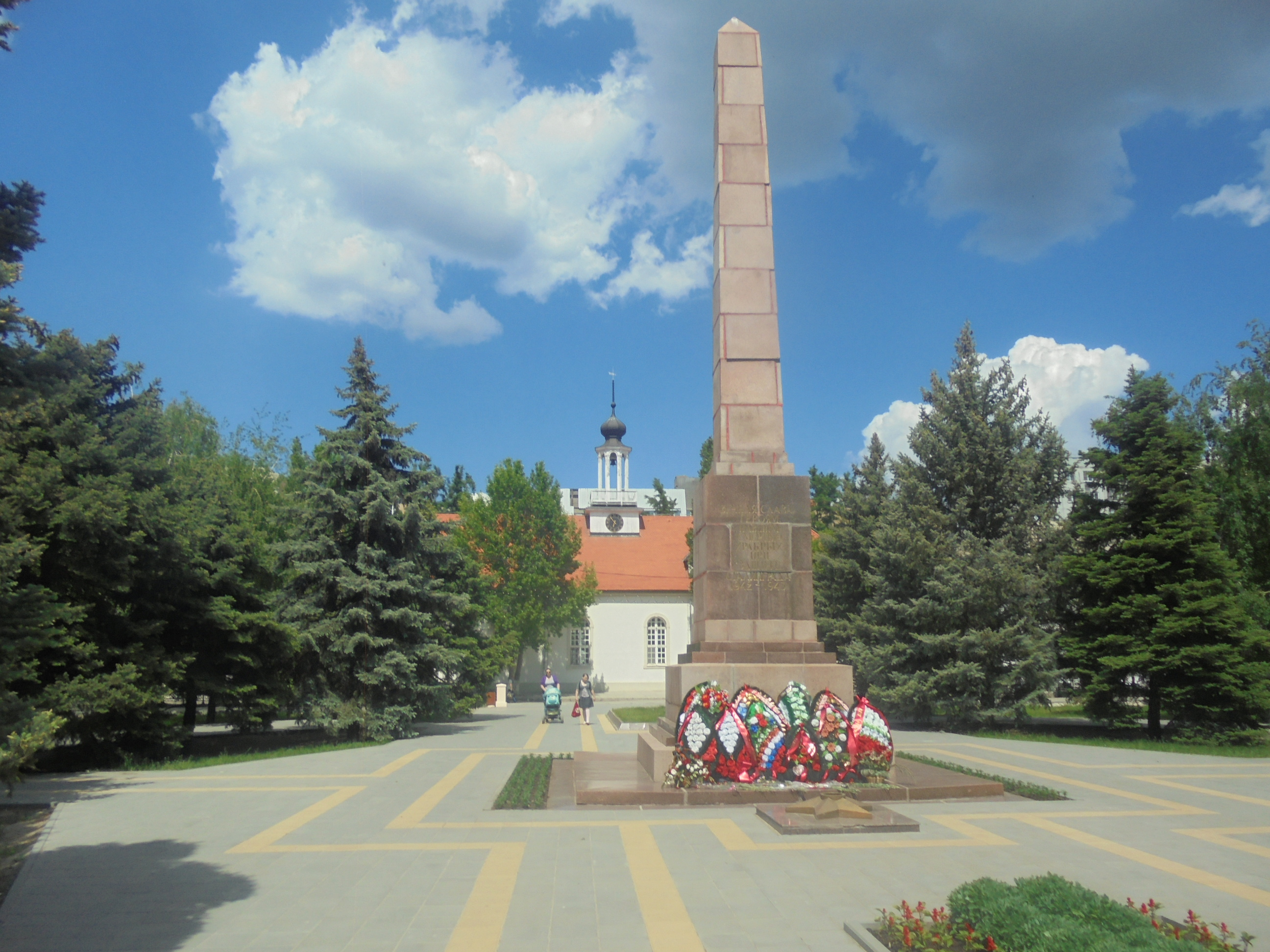 Вечный огонь на фоне Кирхи в Сарепте